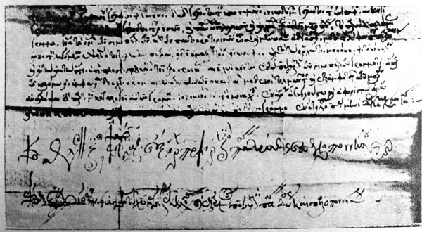 Писмо на солунския митрополит Йоасаф, 16 век.